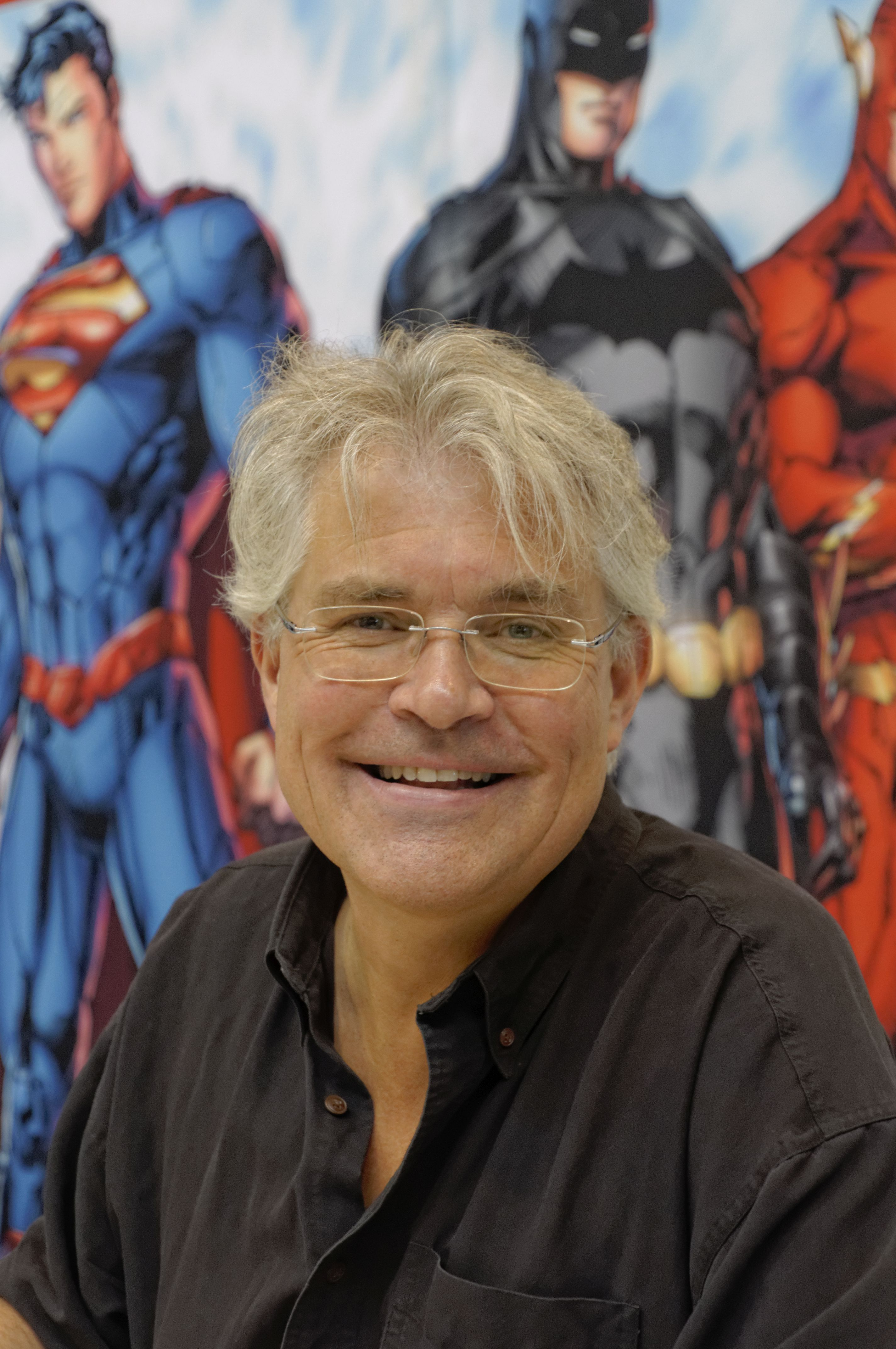 Bilder von der Comic Con Germany 2019 in Stuttgart